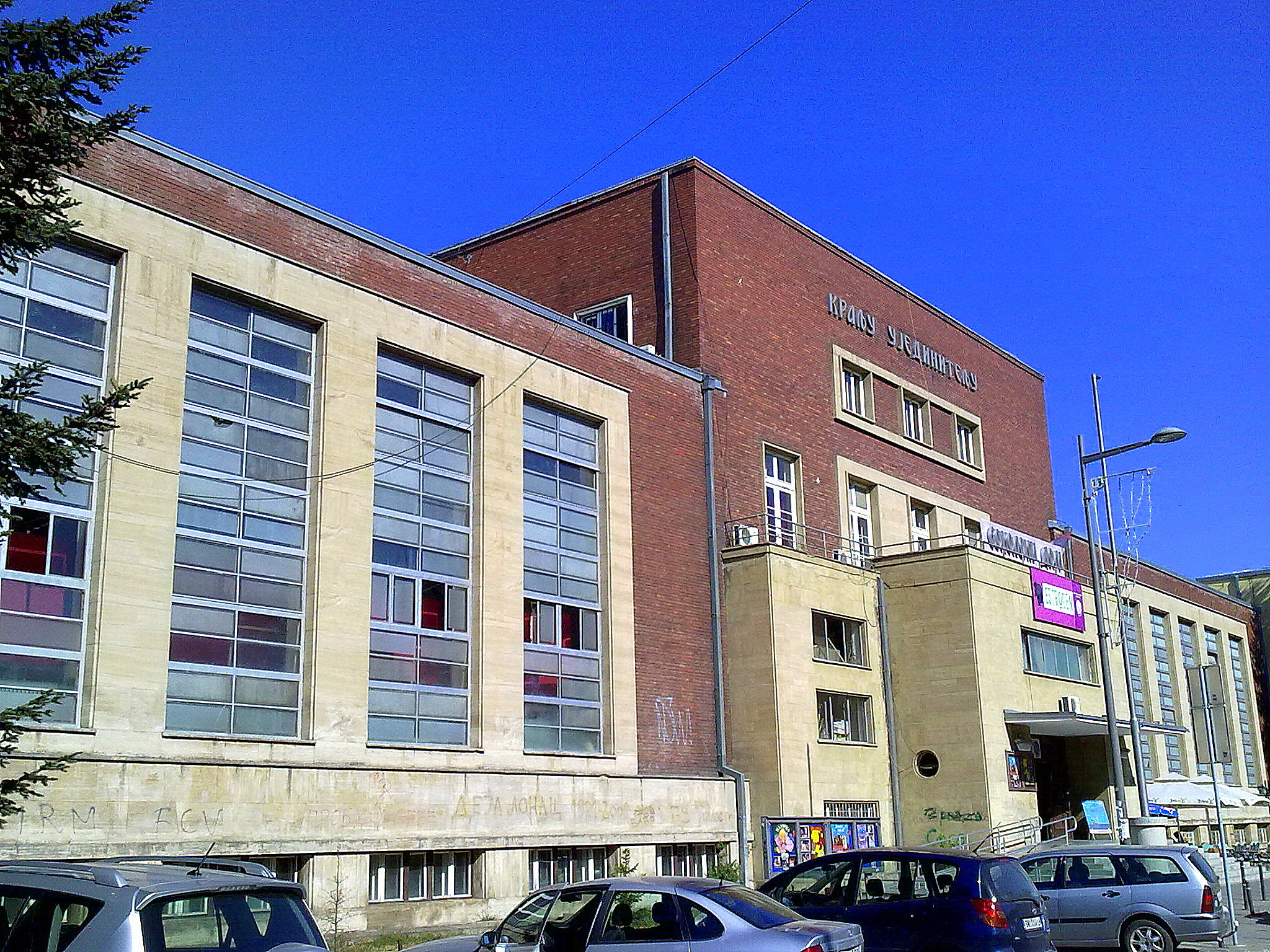 Позориште младих основано је 1931. године као Луткарско позориште, при Соколском друштву у Новом Саду. Позориште је настало из Соколскe секције луткара, која је формирана претходне, 1930. године, уз велику подршку старешина Сокола, др Владимира Белајчића и др Игњата Павласа.